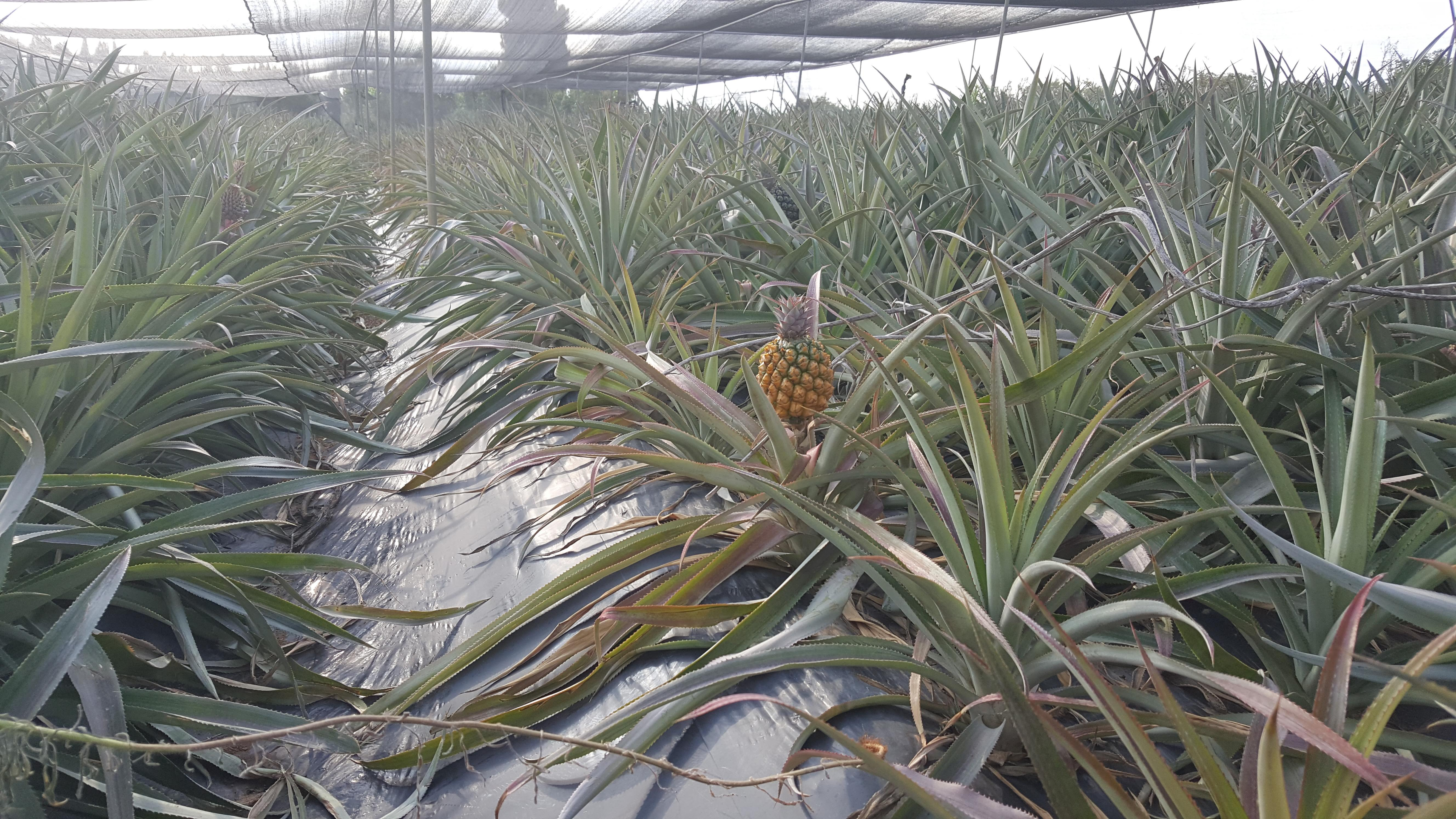 אננס גדל תחת רשת צל במושב חרות, ישראל